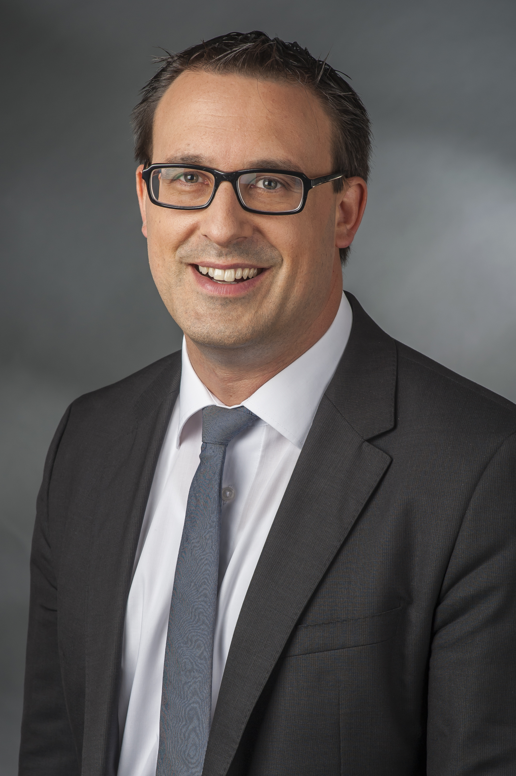 Sören Bartol (* 4. September 1974 in Hamburg) ist ein deutscher Politiker (SPD).